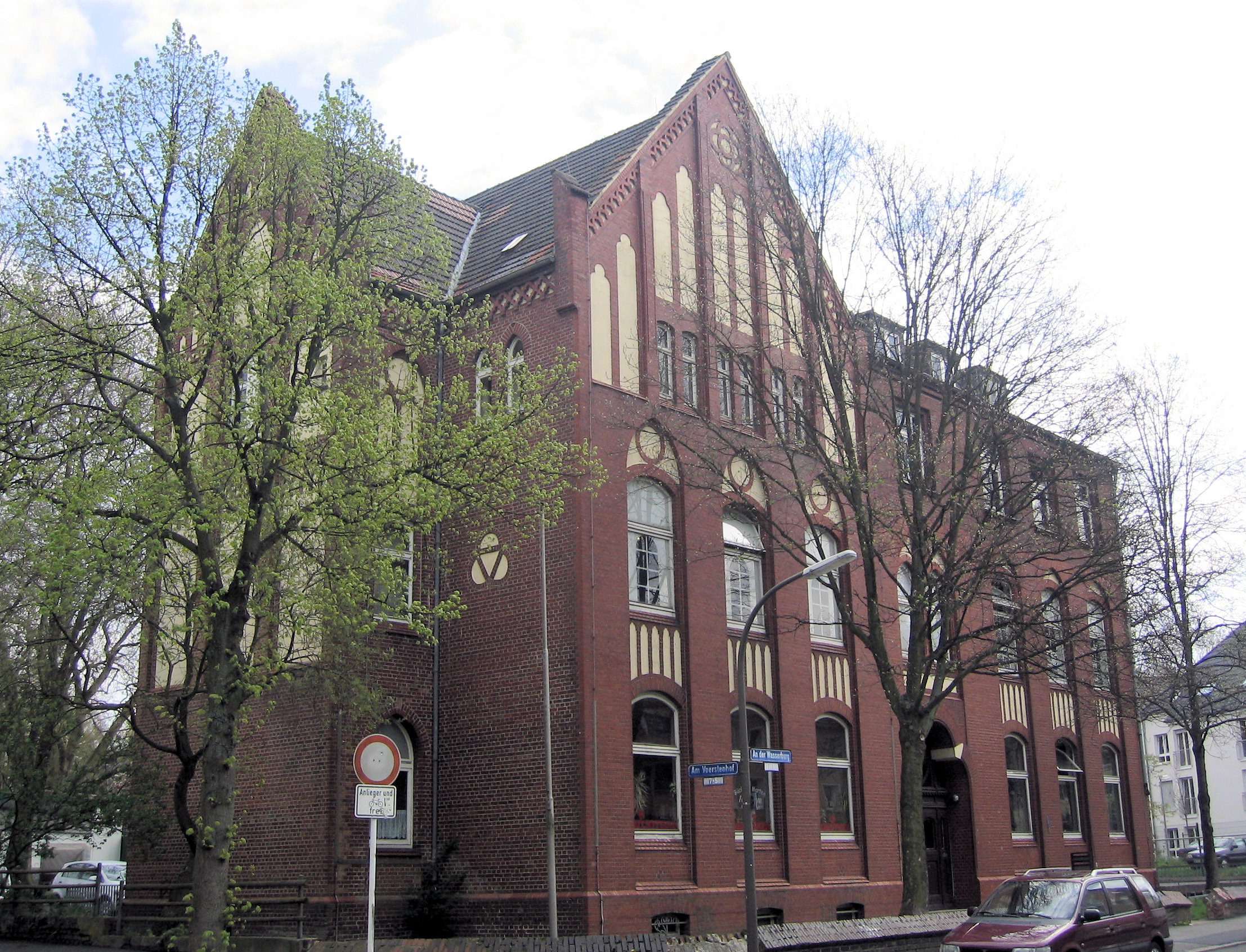 Westfälisches Schulmuseum Dortmund-Marten